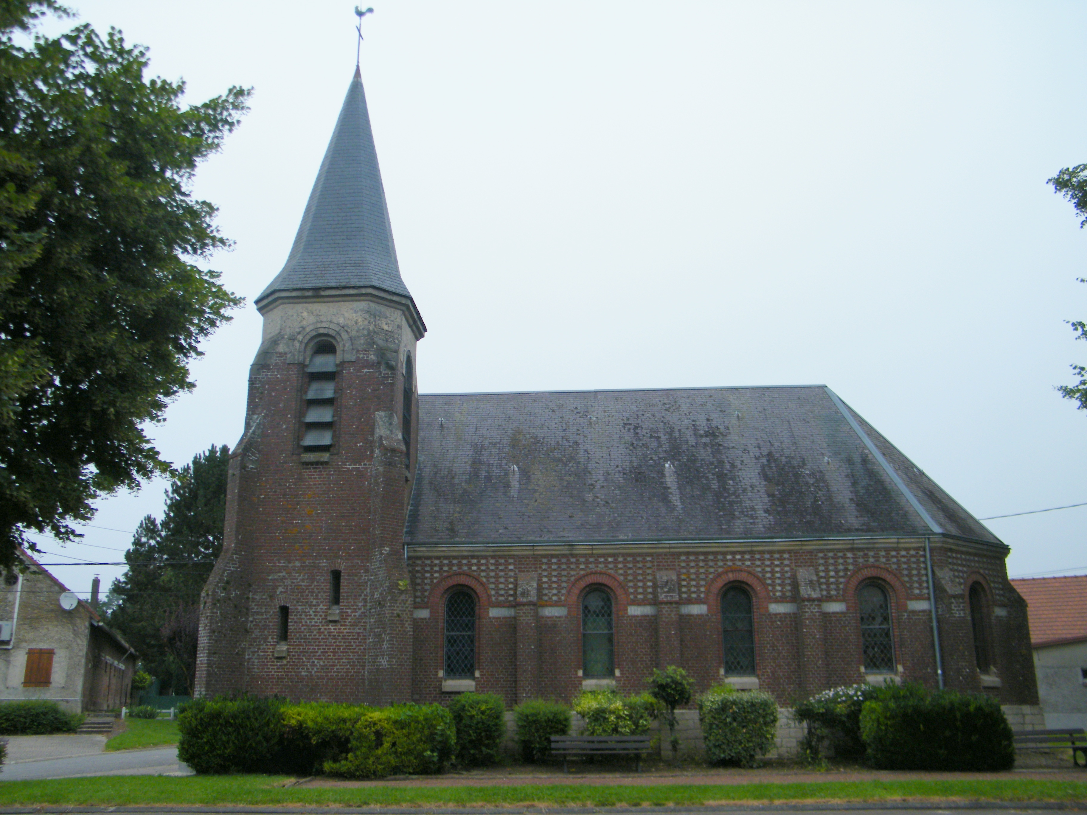 Eglise.